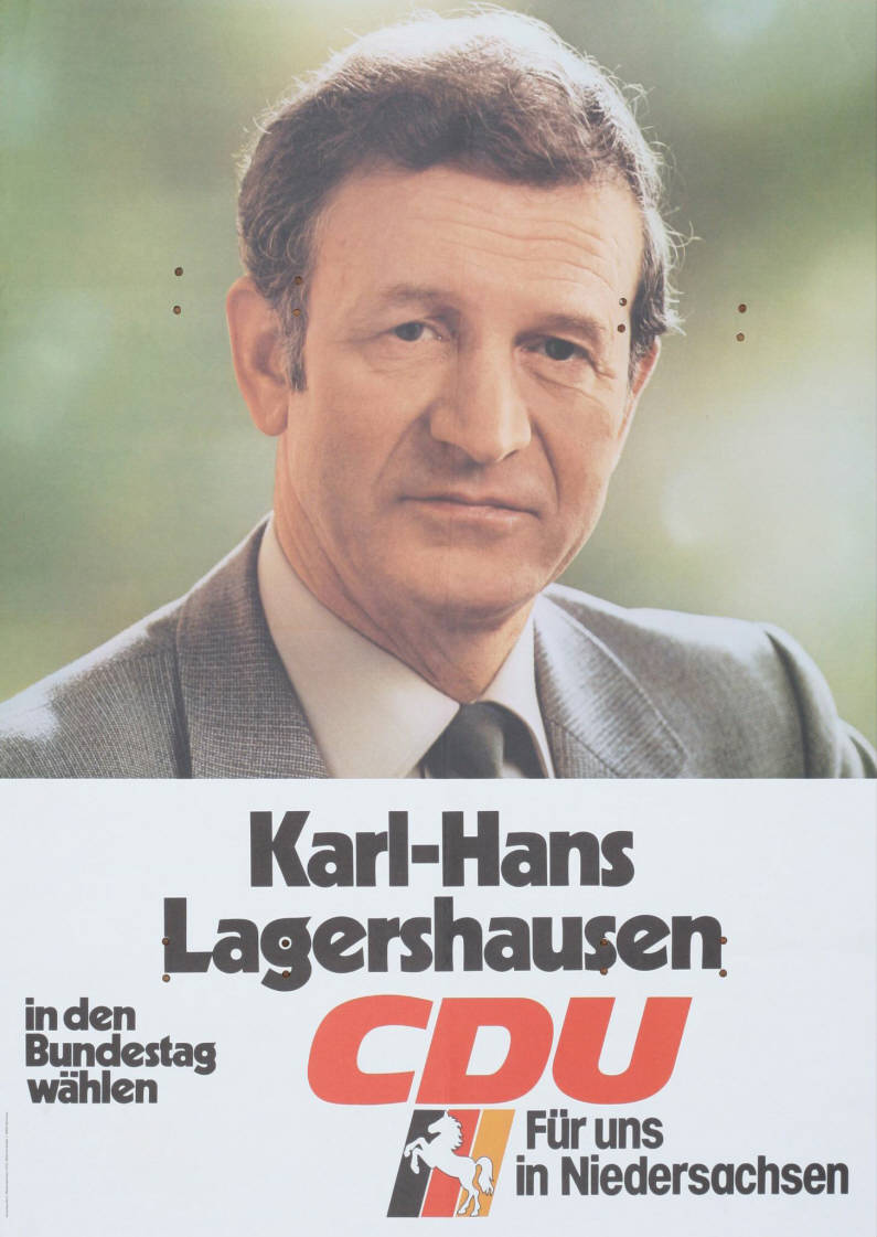 Karl-Hans Lagershausen in den Bundestag wählen CDU Für uns in Niedersachsen Abbildung: Porträtfoto Plakatart: Kandidaten-/Personenplakat mit Porträt Auftraggeber: Verantw.: Niedersachsen-CDU, Hannover Objekt-Signatur: 10-001: 2484 Bestand: Plakate zu Bundestagswahlen (10-001) GliederungBestand10-18: Plakate zu Bundestagswahlen (10-001) » Die 9. Bundestagswahl am 5. Oktober 1980 » CDU » Mit Porträtfoto Lizenz: KAS/ACDP 10-001: 2484 CC-BY-SA 3.0 DE